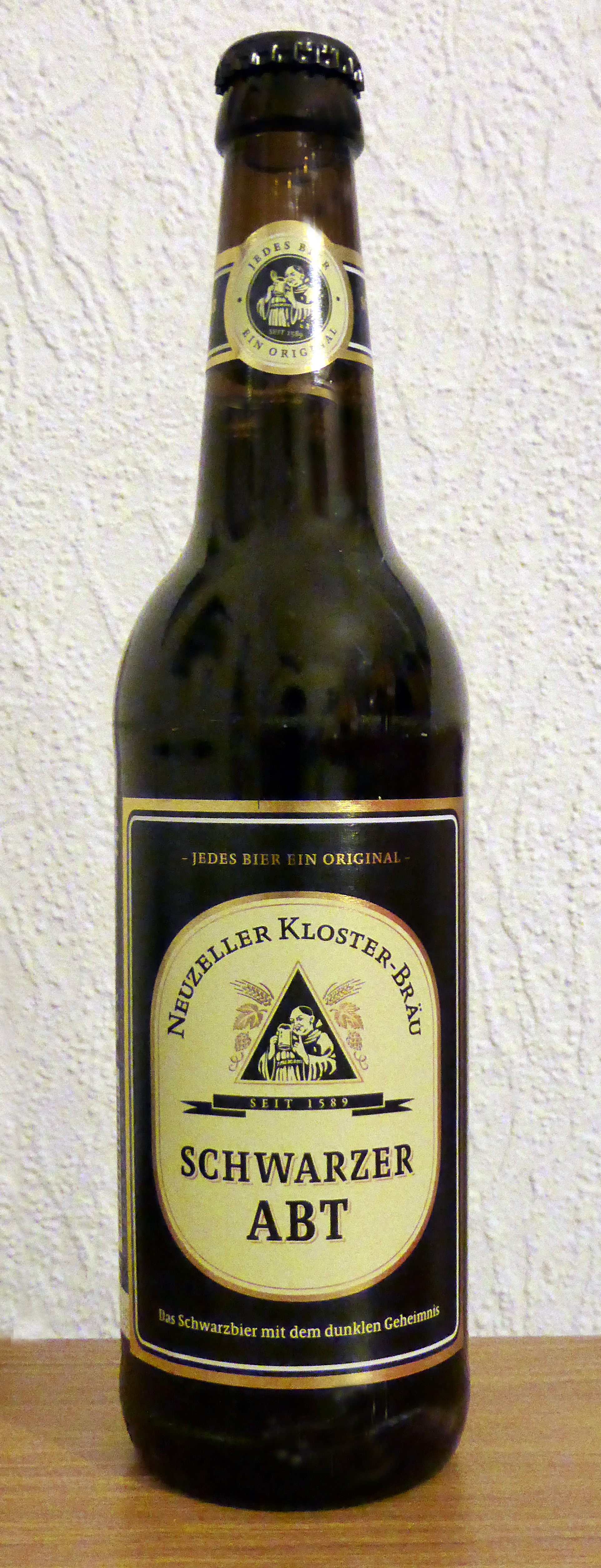 Flasche Schwarzer Abt-Schwarzbier, 2014.